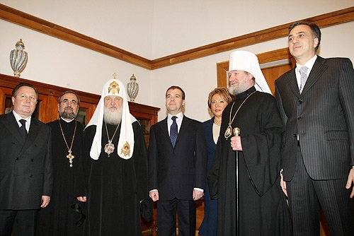 Встреча президента России Дмитрия Медведева с лауреатами премии Международного фонда единства православных народов. Президент Международного фонда единства православных народов Валерий Алексеев, декан православного факультета Бухарестского университета протоиерей Стефан Букиу, Патриарх Московский и всея Руси Кирилл, Дмитрий Медведев, губернатор Санкт-Петербурга Валентина Матвиенко, архиепископ Пражский, митрополит Чешских земель и Словакии Христофор (Радим Пулец), и Президент Республики Черногория Филип Вуянович (слева направо).